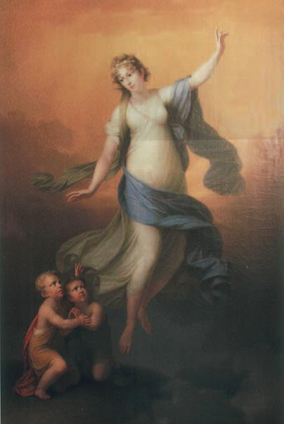 Rudolph Suhrlandt: Apotheose der Helene Paulowna Bezeichnet u. Mitte: R. Suhrlandt pinx 1806 ursprünglich im Helenen-Paulownen-Mausoleum, seit 1882 im Museum Schwerin SMS/Slg. Herzog Christian Ludwig (Restitutionsanspruch)